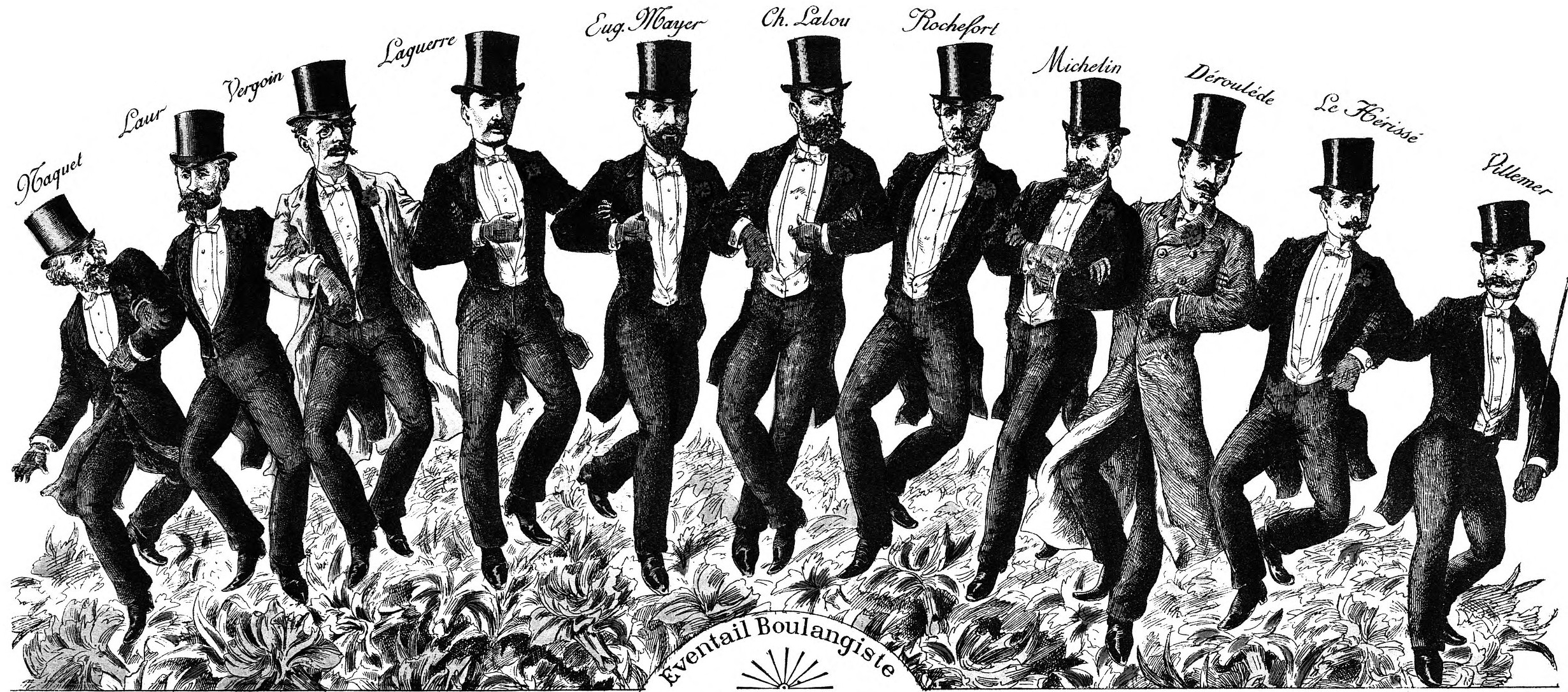 "Éventail boulangiste" (image d’Épinal).